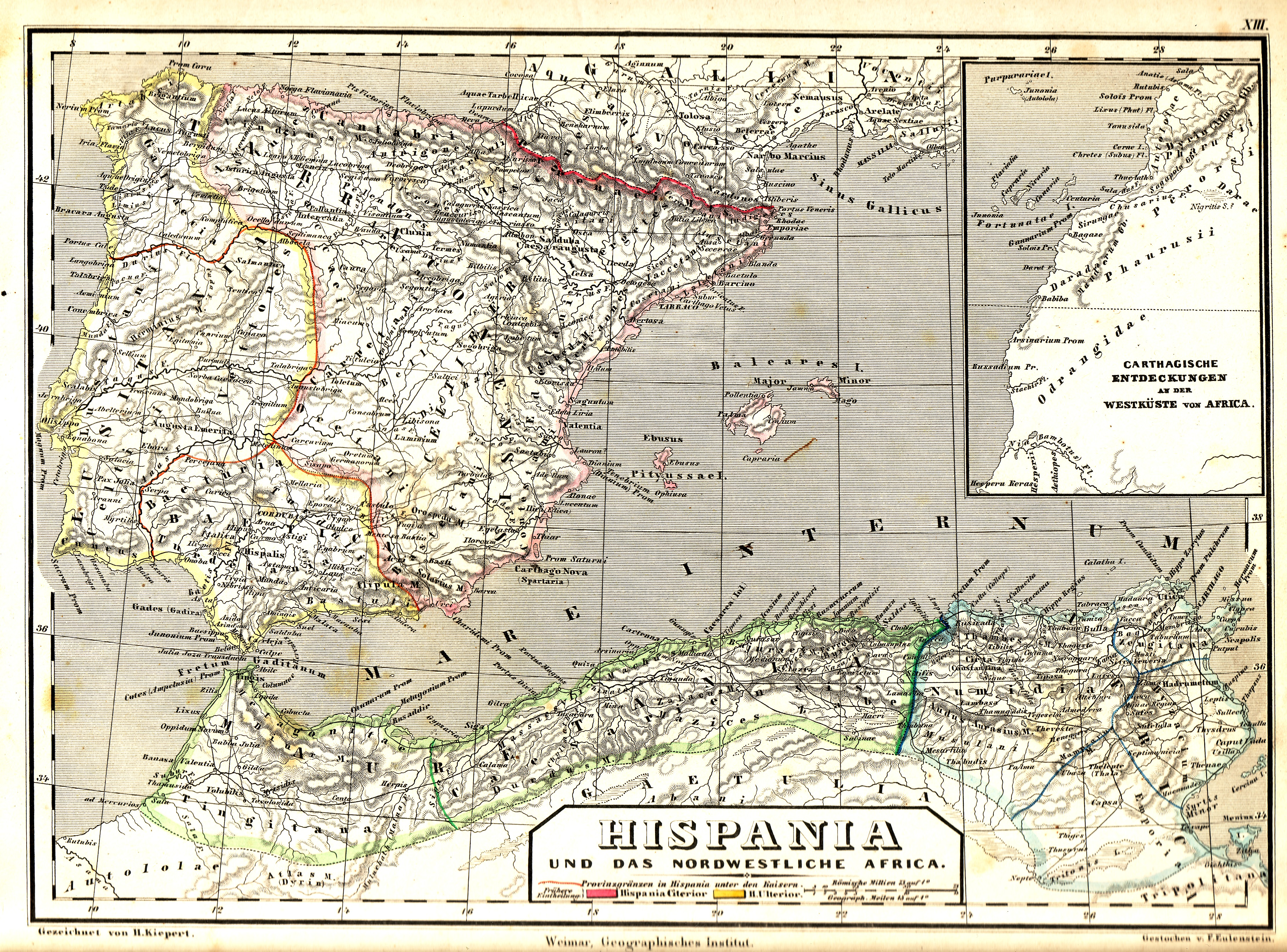 Hispania und das nordwestliche Africa